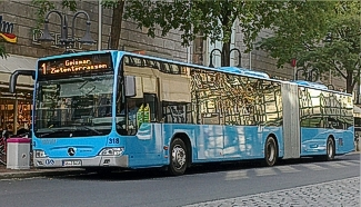 Wagen 318 der GöVB